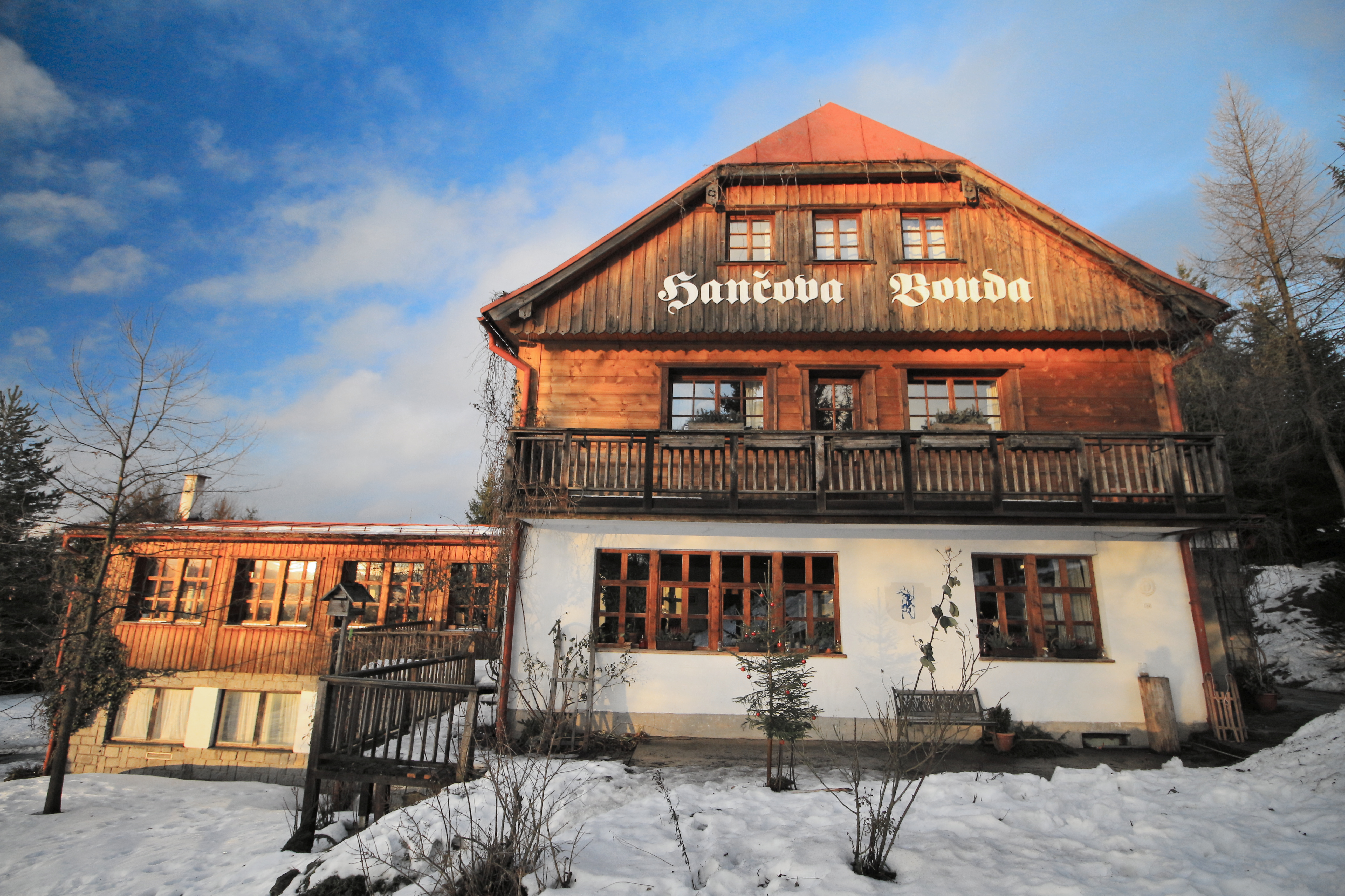 Benecko Hančova bouda